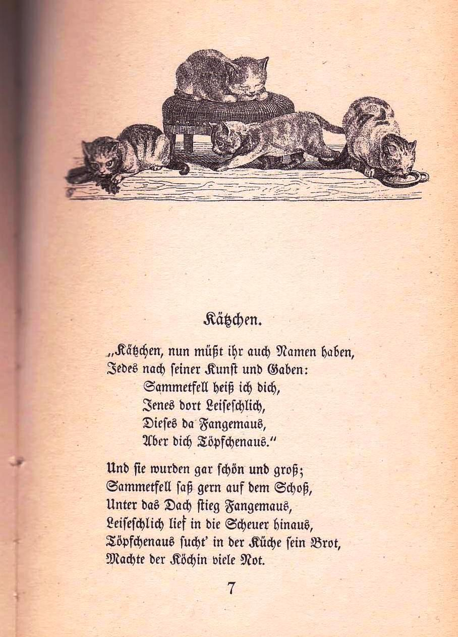 S. 7 aus IB 309 Hey (†1854) /Speckter († 1871): Fabeln